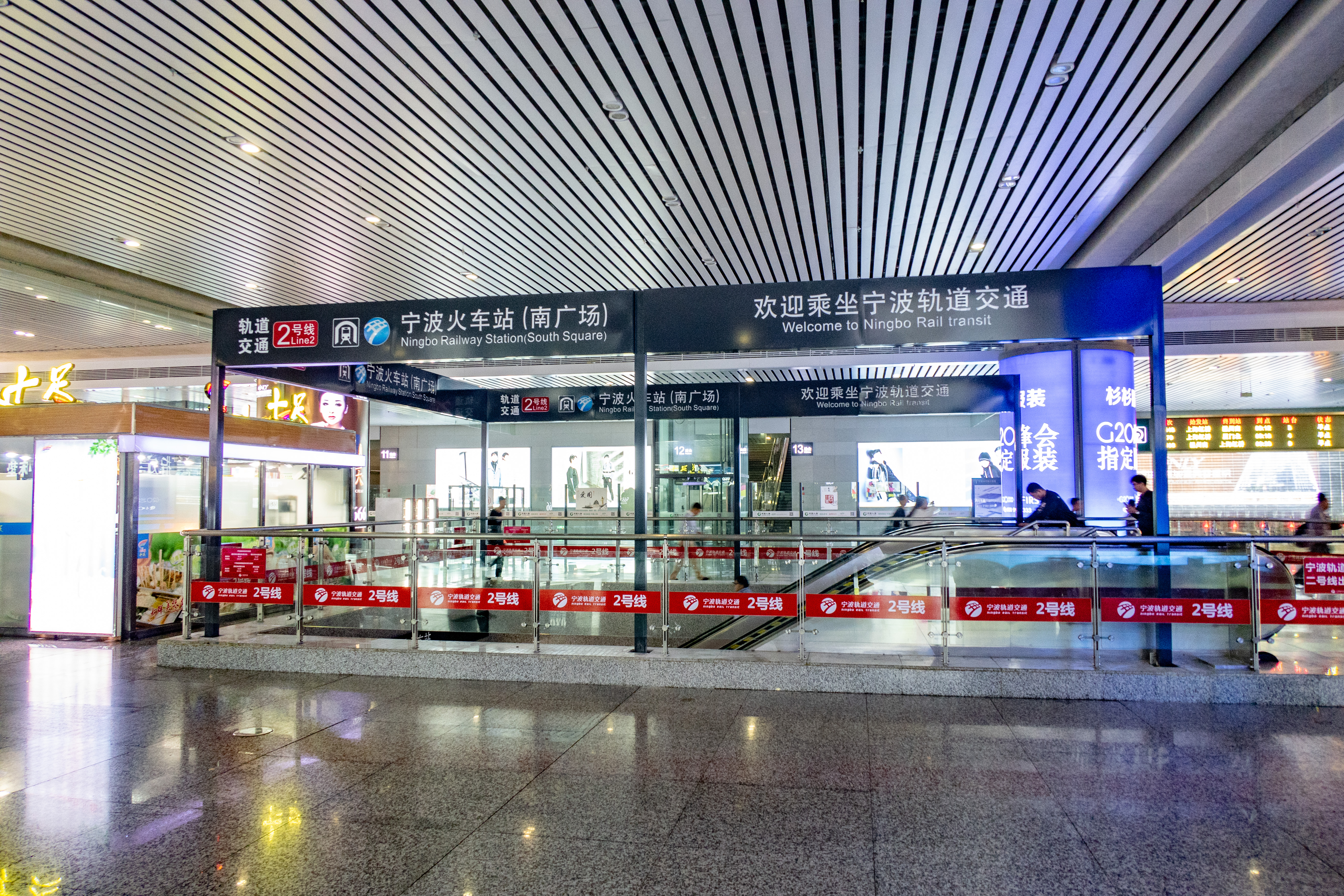 地铁宁波火车站南广场出入口